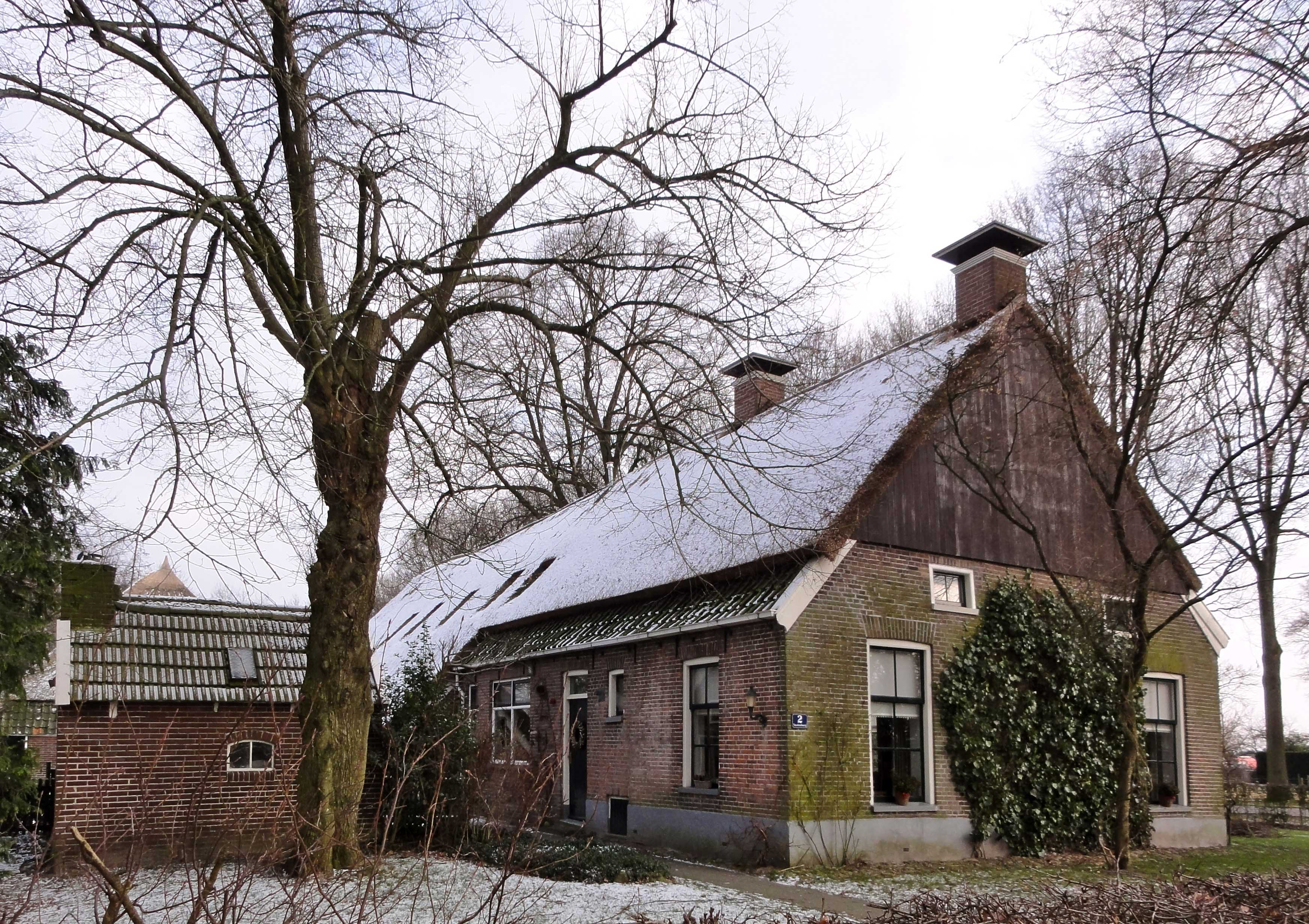 Hallenhuisboerderij aan de Schaapskuilweg in Valthe, provinciaal monument